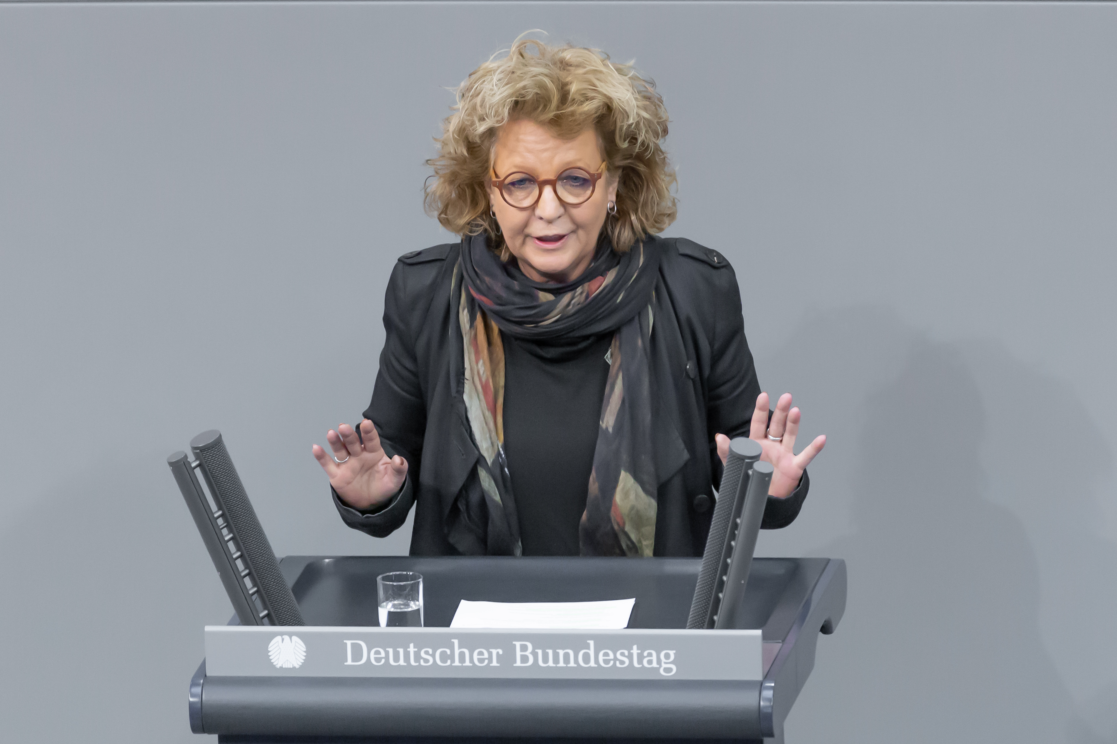 Deutscher Bundestag; Beate Müller-Gemmecke, B90/Die Grünen, spricht im Plenum